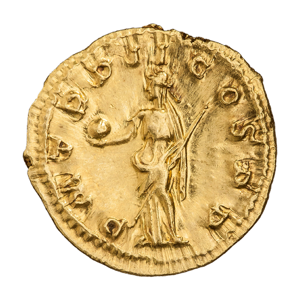 Ауреус. Гордиан III. Ок. 239 г. (реверс). Надпись P M TR P II COS PP. Провиденция (персонификация божественного провидения) стоит, влево; в руках держит шар и скипетр.